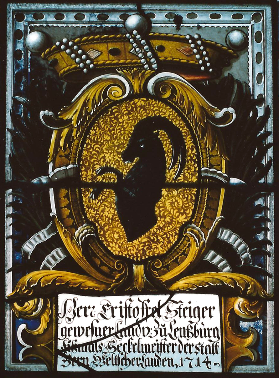 Scheibe Christoph Steiger (I.)